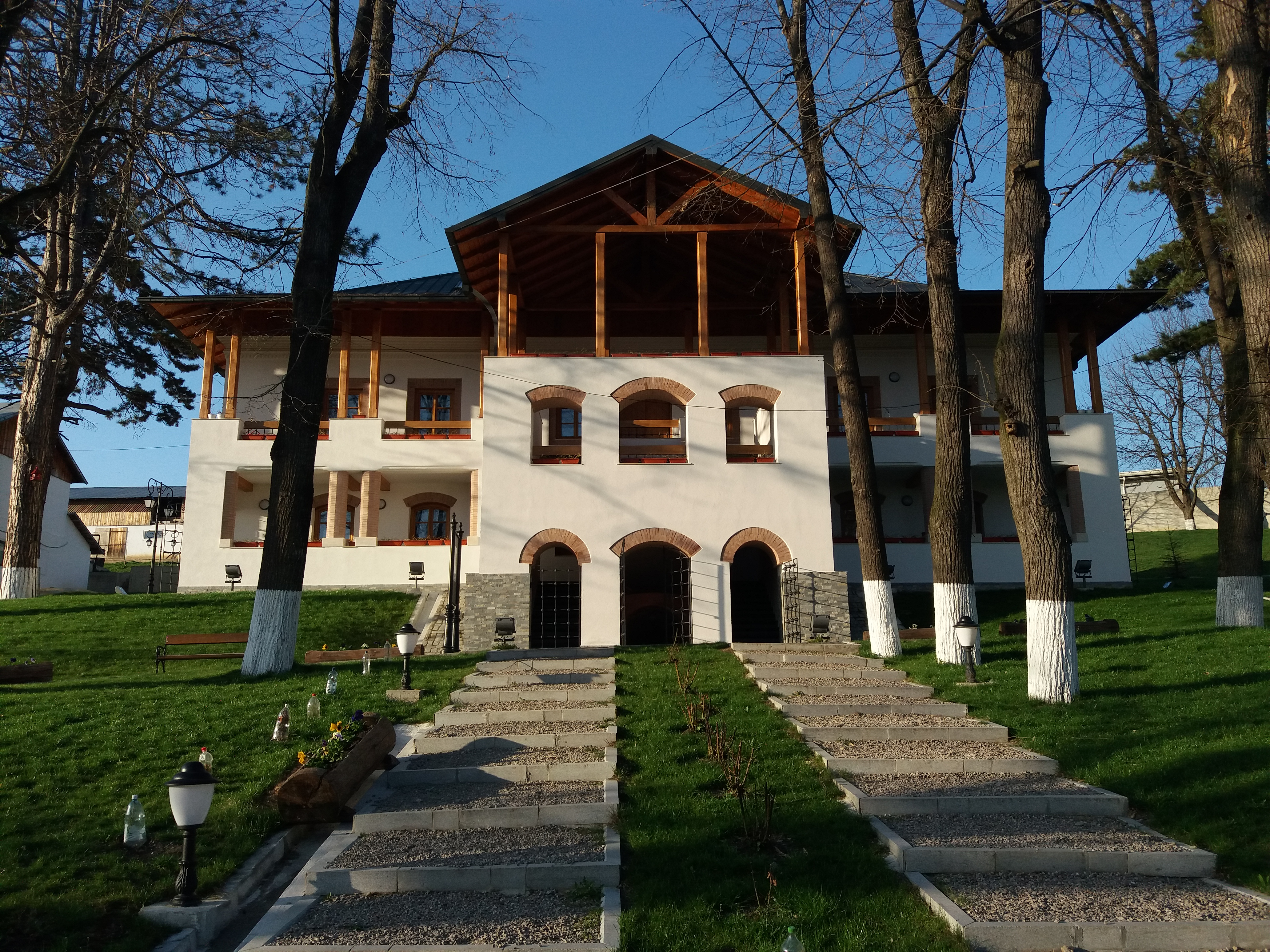 Mănăstirea Coșula este o mănăstire de călugări amplasată în satul Coșula (din județul Botoșani). 02